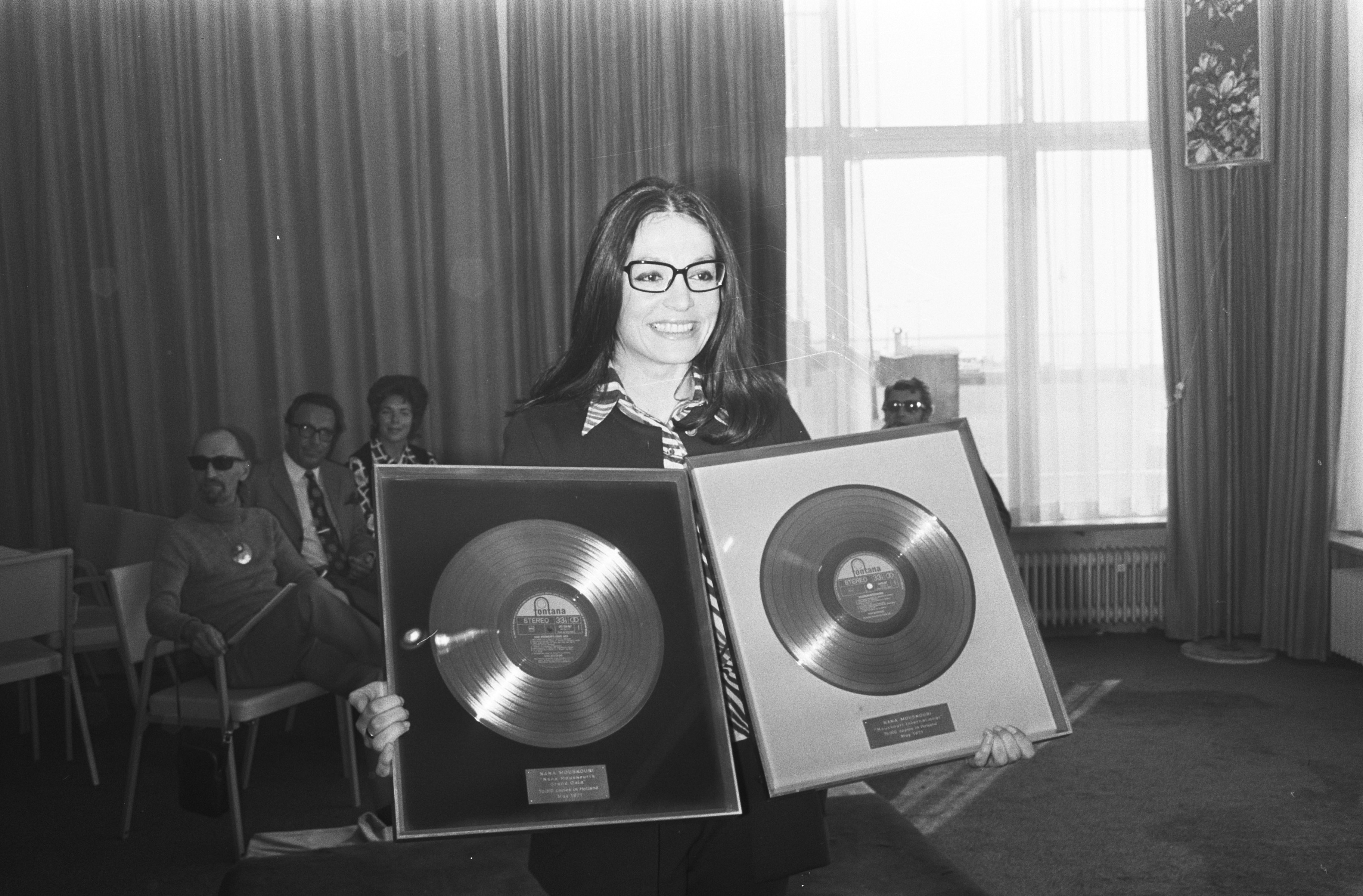 Collectie / Archief : Fotocollectie Anefo Reportage / Serie : Nana Mouskouri krijgt een gouden en een platina plaat in het Kurhaus te Beschrijving : Nana Mouskouri toont haar platen Datum : 13 mei 1971 Locatie : Scheveningen, Zuid-Holland Trefwoorden : portretten, zangers Persoonsnaam : Mouskouri, Nana Fotograaf : Fotograaf Onbekend / Anefo Auteursrechthebbende : Nationaal Archief Materiaalsoort : Negatief (zwart/wit) Nummer archiefinventaris : bekijk toegang 2.24.01.05 Bestanddeelnummer : 924-5530